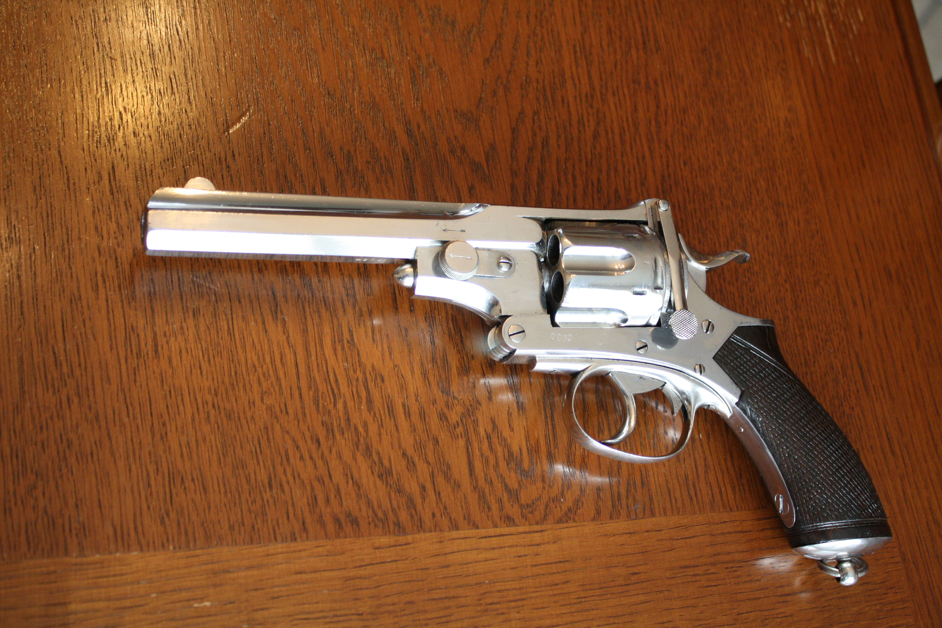 Revolver Webley n°4 Pryse